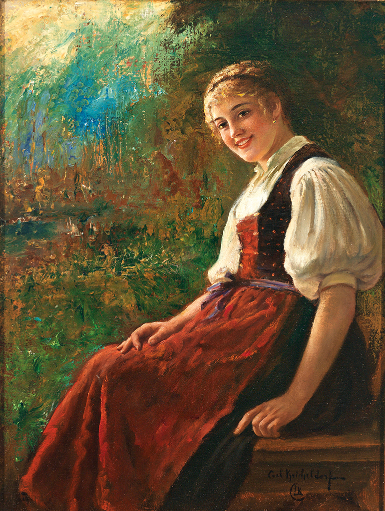 Portrait eines Mädchens in Tracht. Öl auf Leinwand, 61 x 46 cm